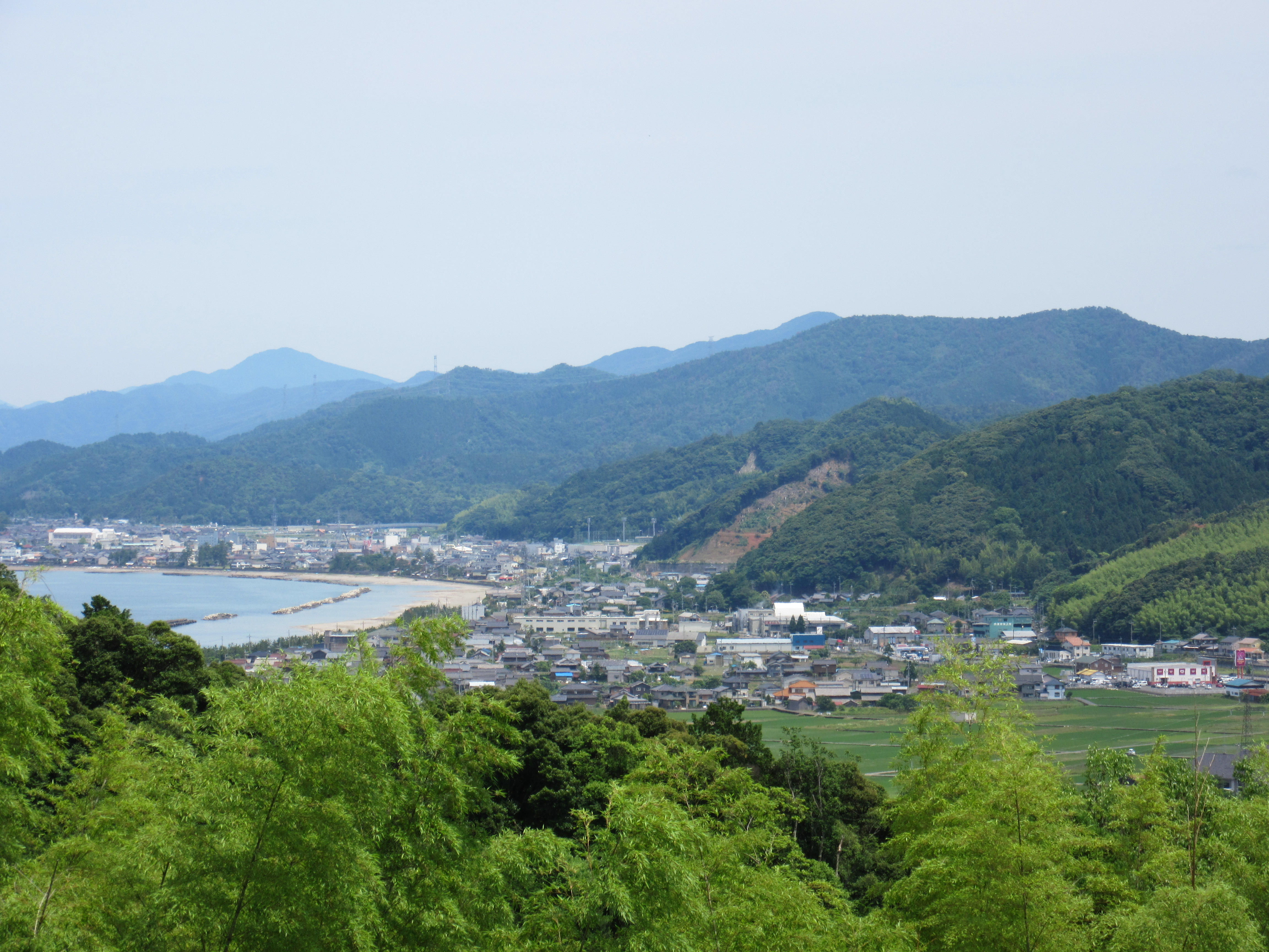 高浜町中心部。中山寺より撮影